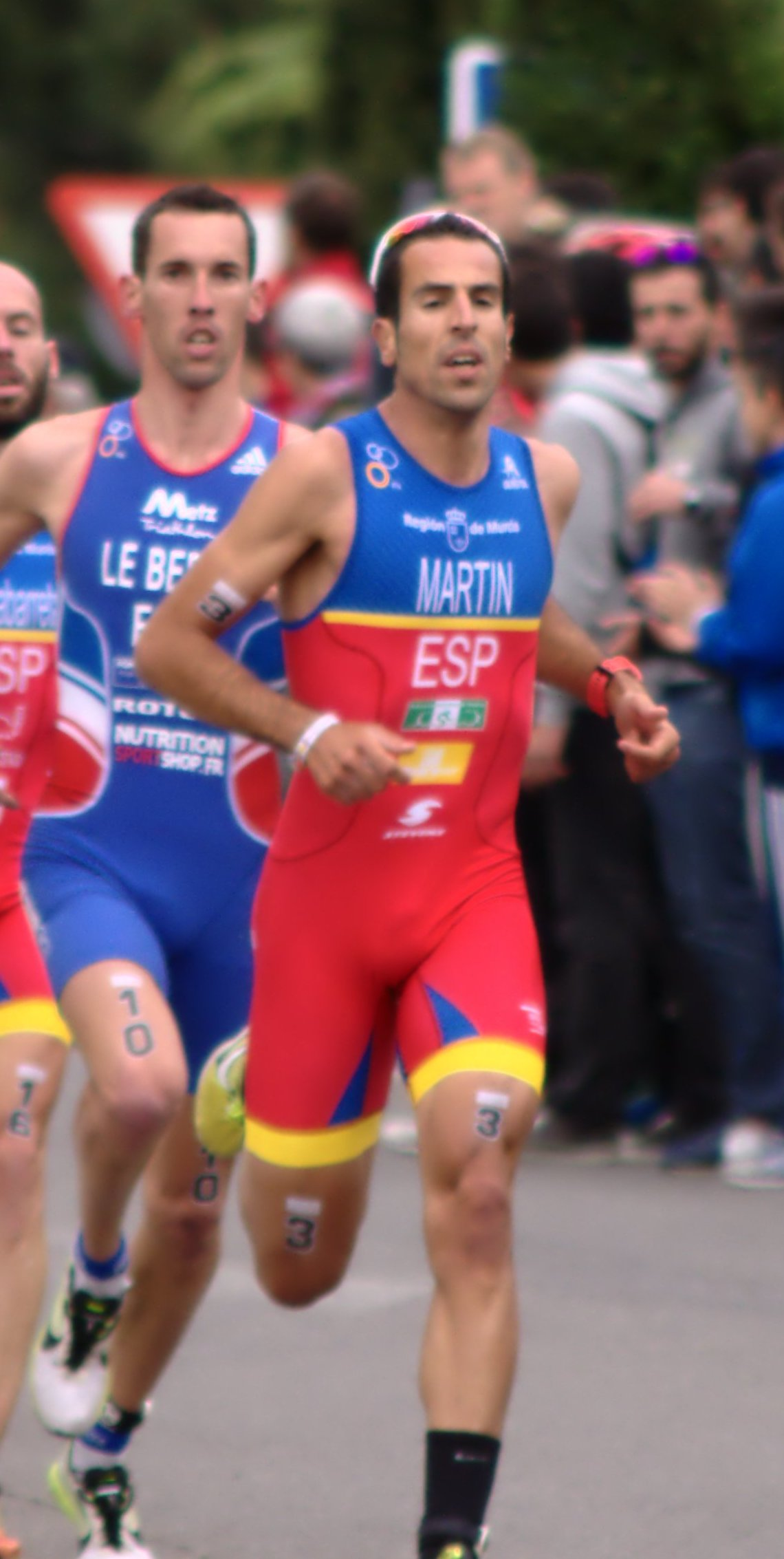 Emilio Martín en el Campeonato de Europa de duatlón 2015